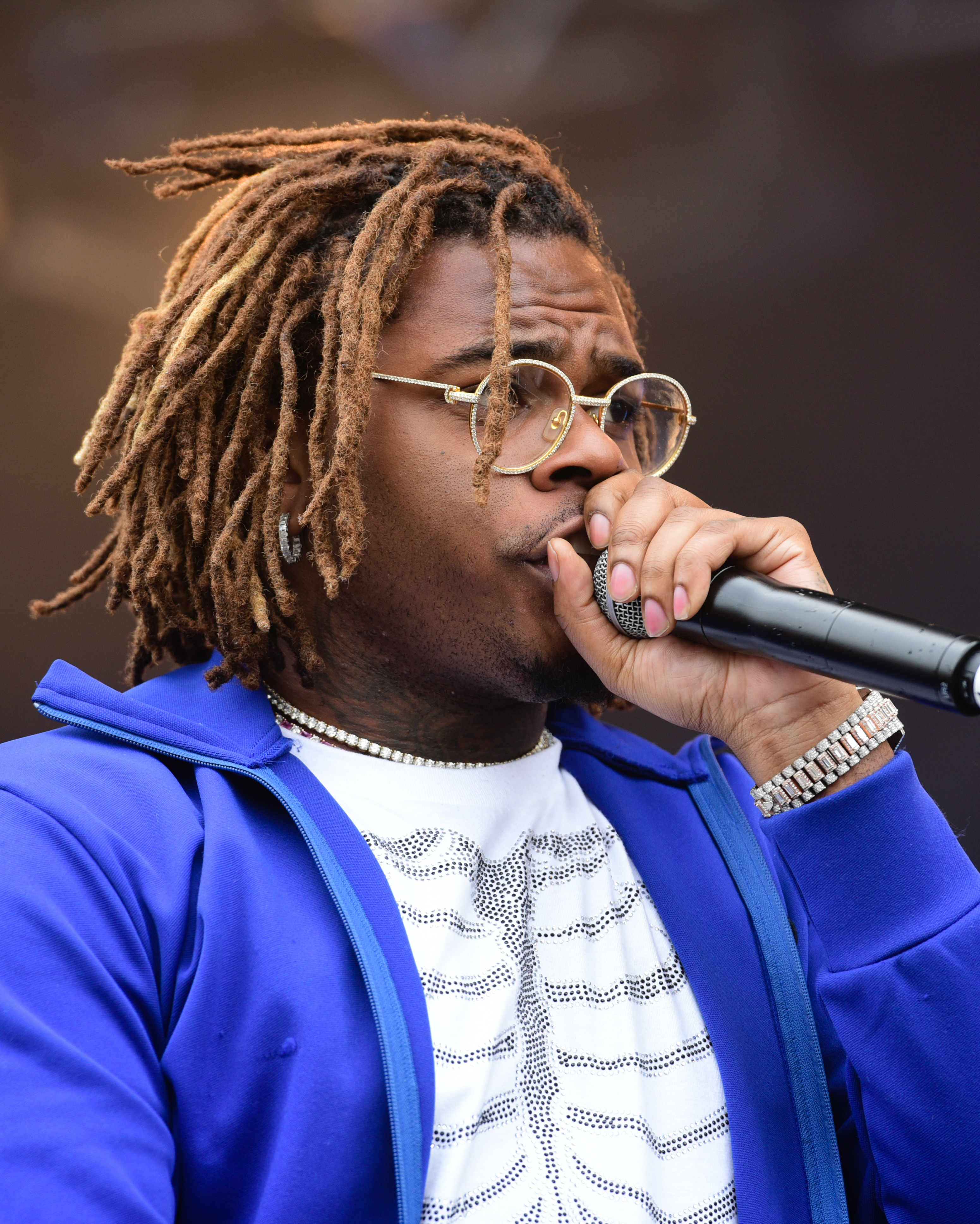 Gunna live auf dem Openair Frauenfeld 2019